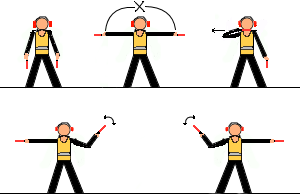 Some Maeshalling Signals